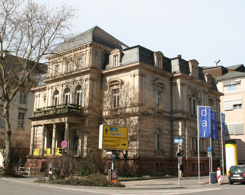 Das Deutsch-Amerikanische Institut in Heidelberg